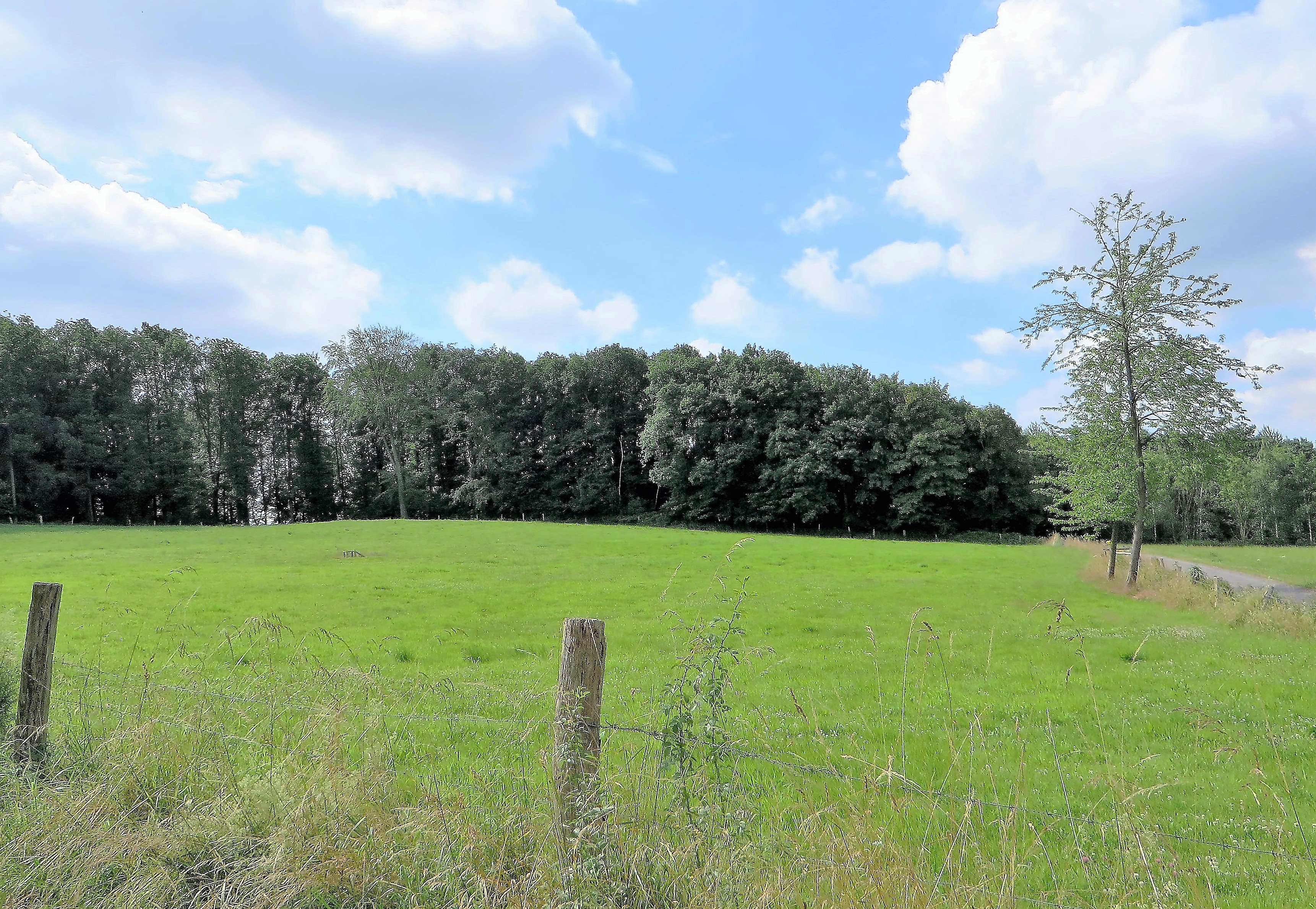 Landschaftsschutzgebiet „Lichtenboecken“ in Hagen-Berchum. Blick vom Garenfelder Weg.